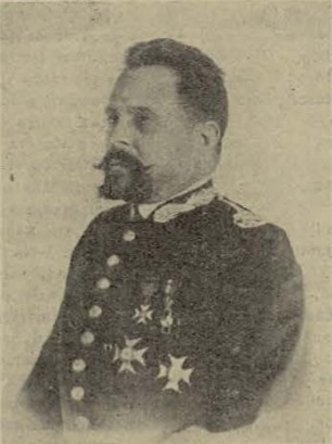 Matías Lloréns Palau